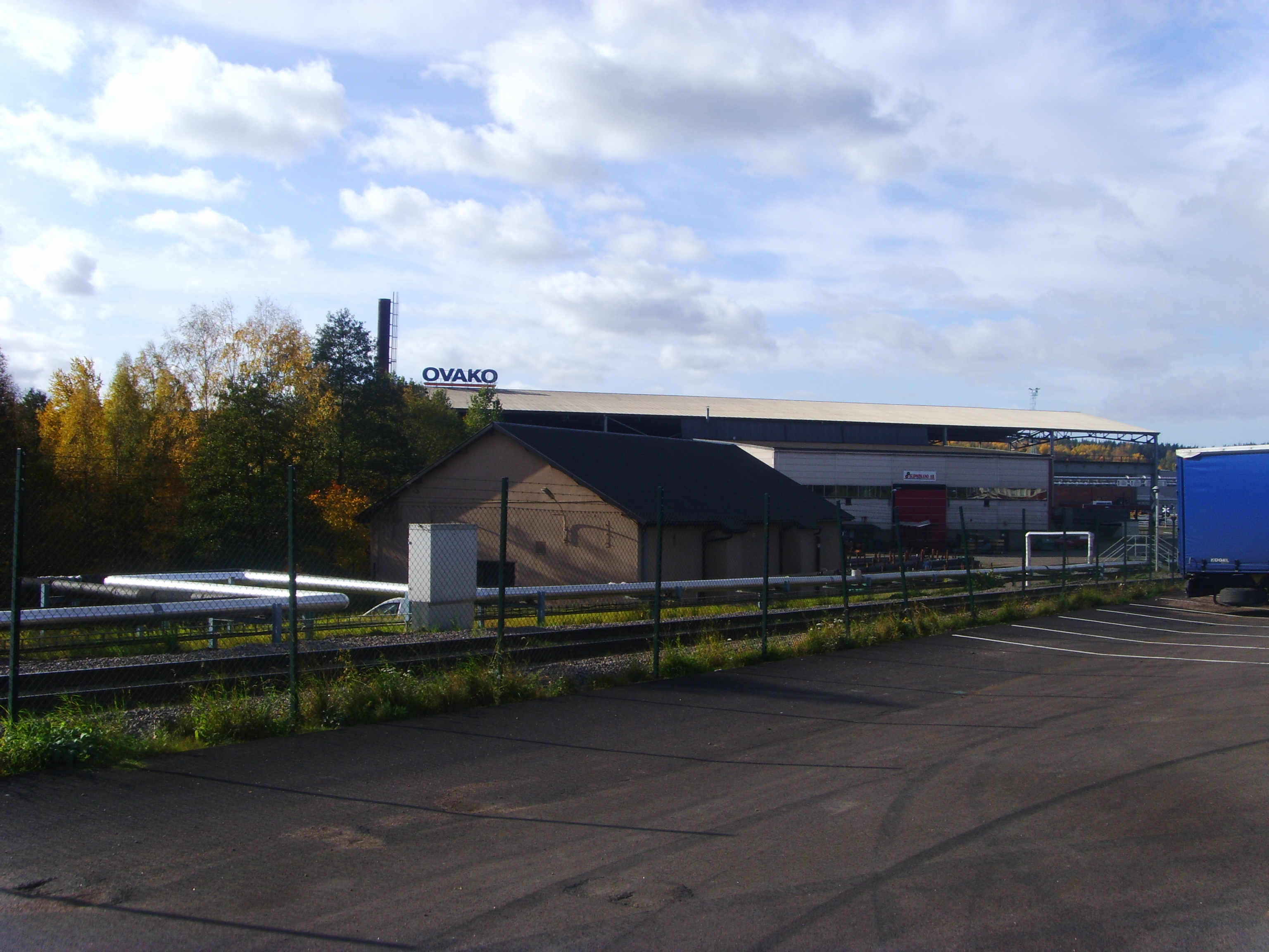 Bruksområdet i Boxholm.